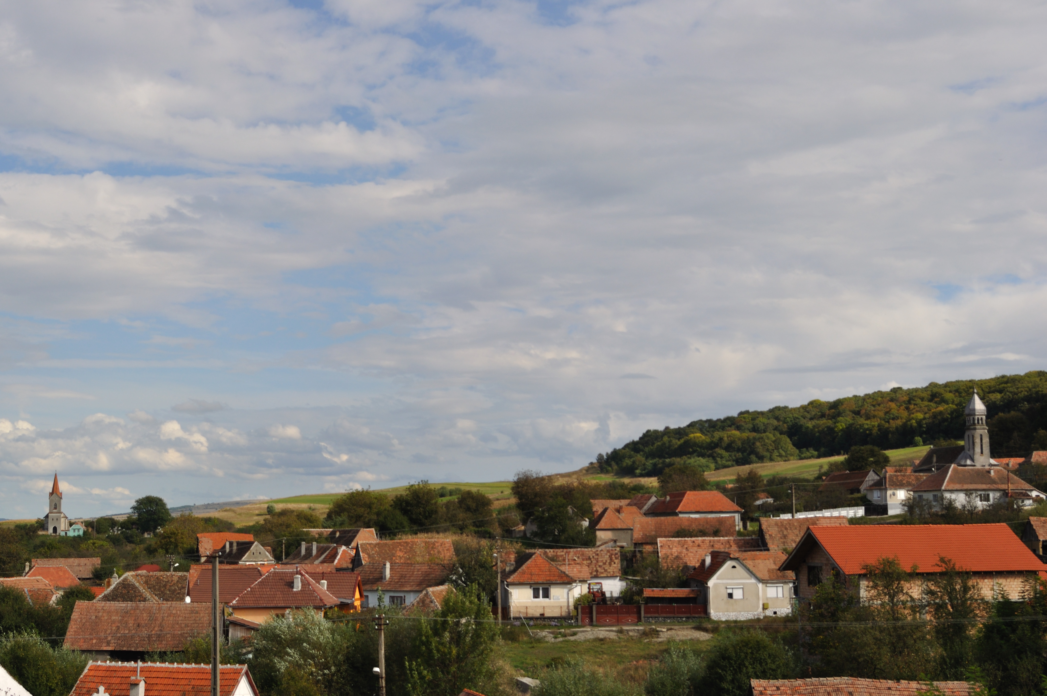 Hașag, județul Sibiu